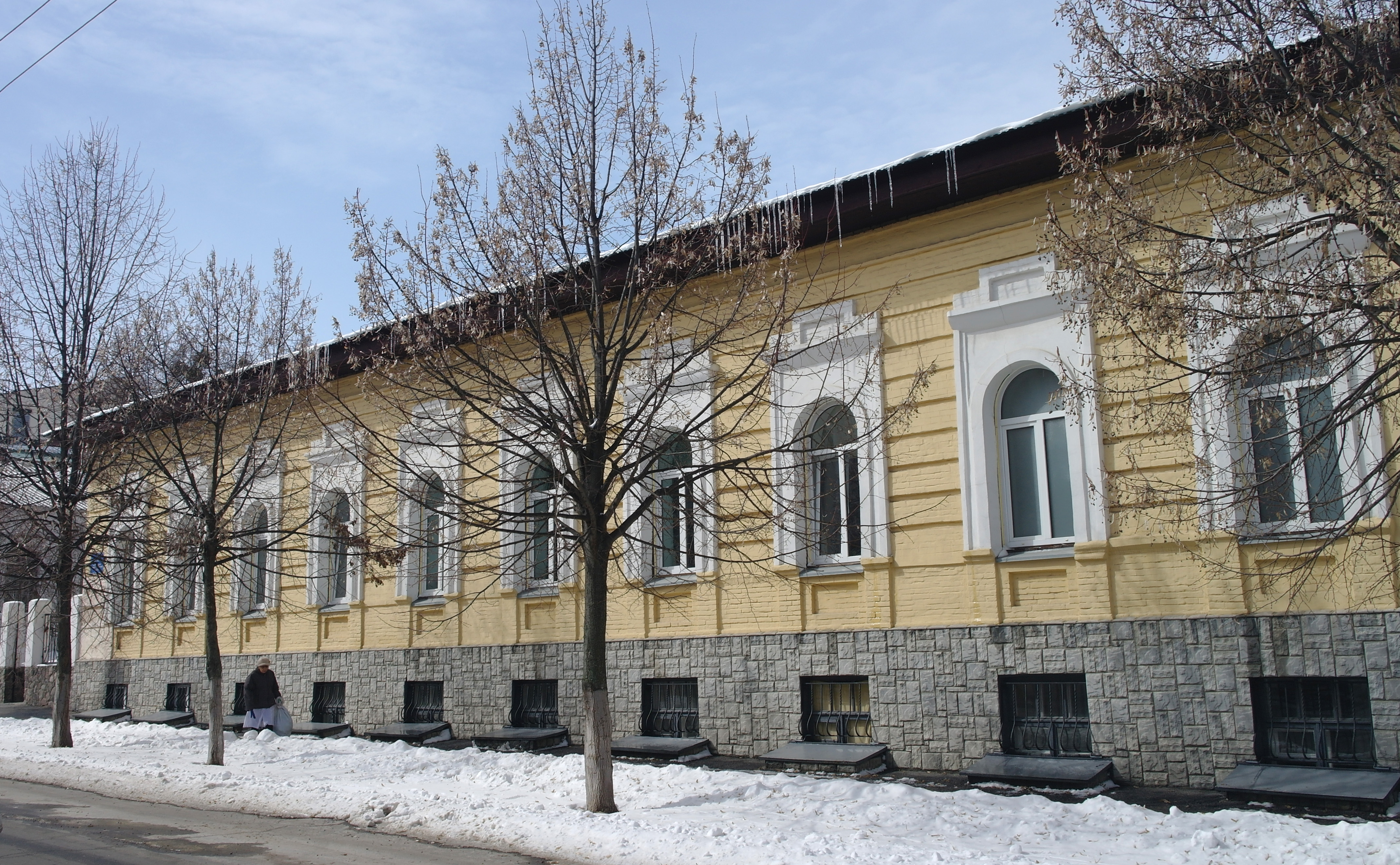 Полтава, синагога